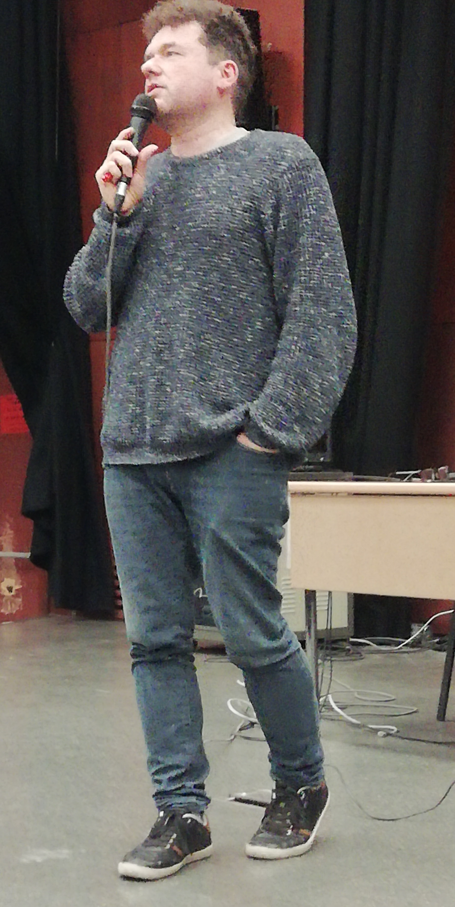 Pascal-Alex Vincent en novembre 2019.